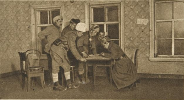 Karjalan metsäsissien esikunta Kiimasjärvellä tammikuussa 1922, äärimmäisenä oikealla Jalmari Takkinen